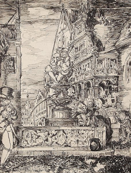 Die bösen Zungen. Frau mit herausgestreckter Zunge beugt sich über einen Brunnen, daneben stehen vier Frauen mit Totenköpfen unter ihren Hauben. Tuschfederzeichnung mit kleiner Deckweißtektur über Bleistift. Illustrationsvorlage für die „Jugend“